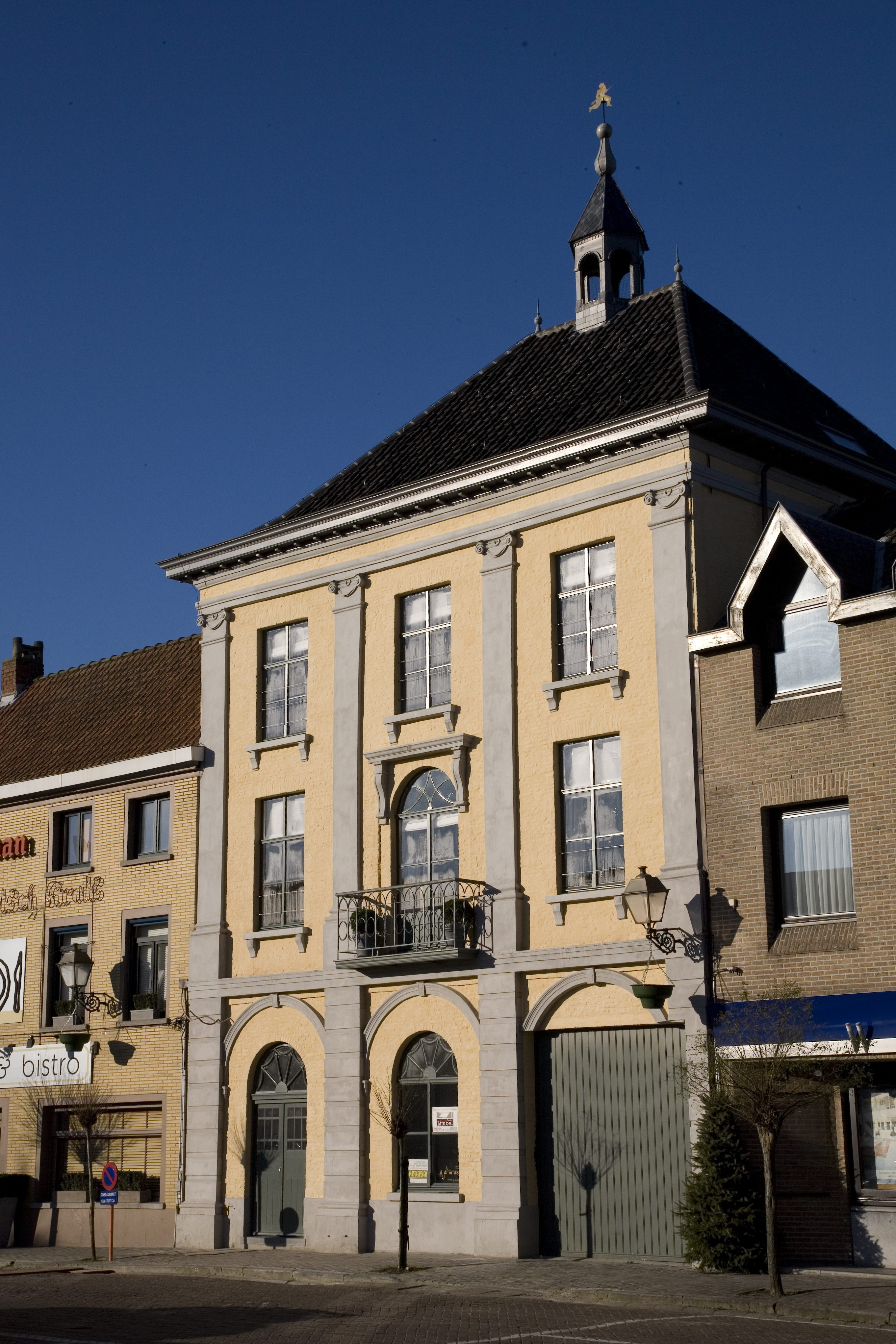 Voormalig gemeentehuis van Wakken